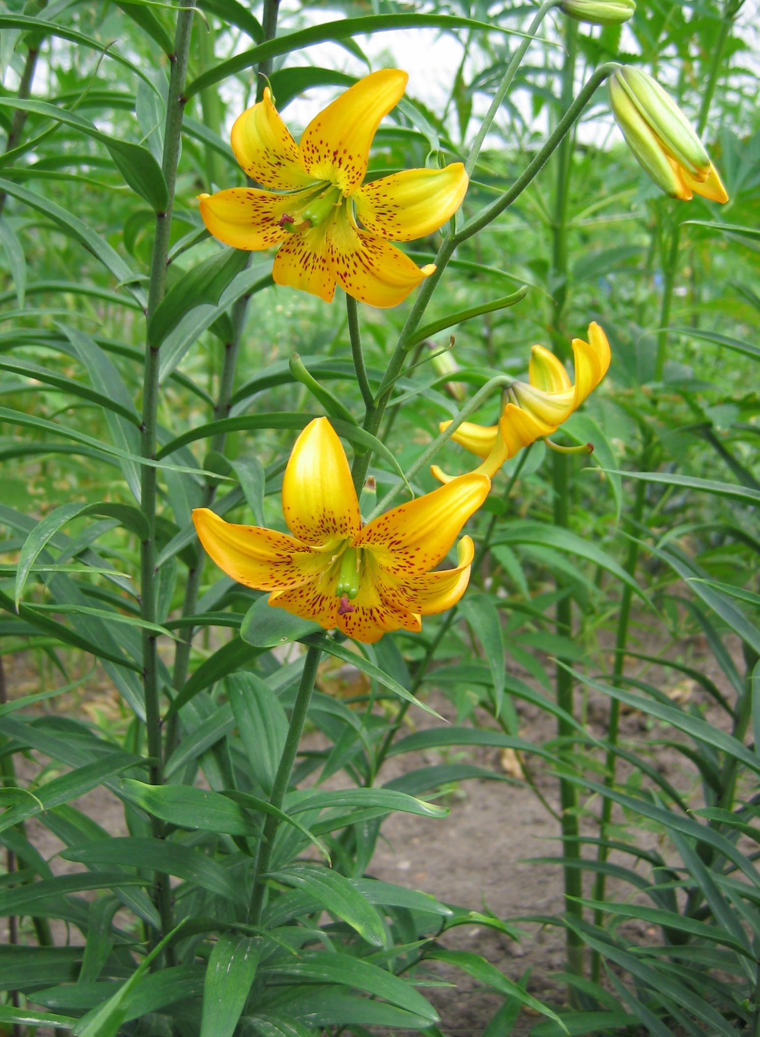 Lilium amabile var. luteum